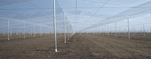 Casa Sombra Almeria